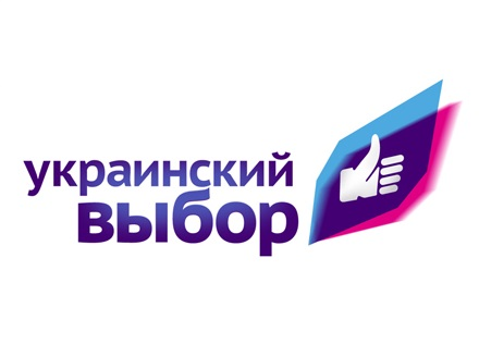 Логотип Українського вибору